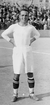 El futbolista valencià Eduardo Cubells, el mag d'Algirós